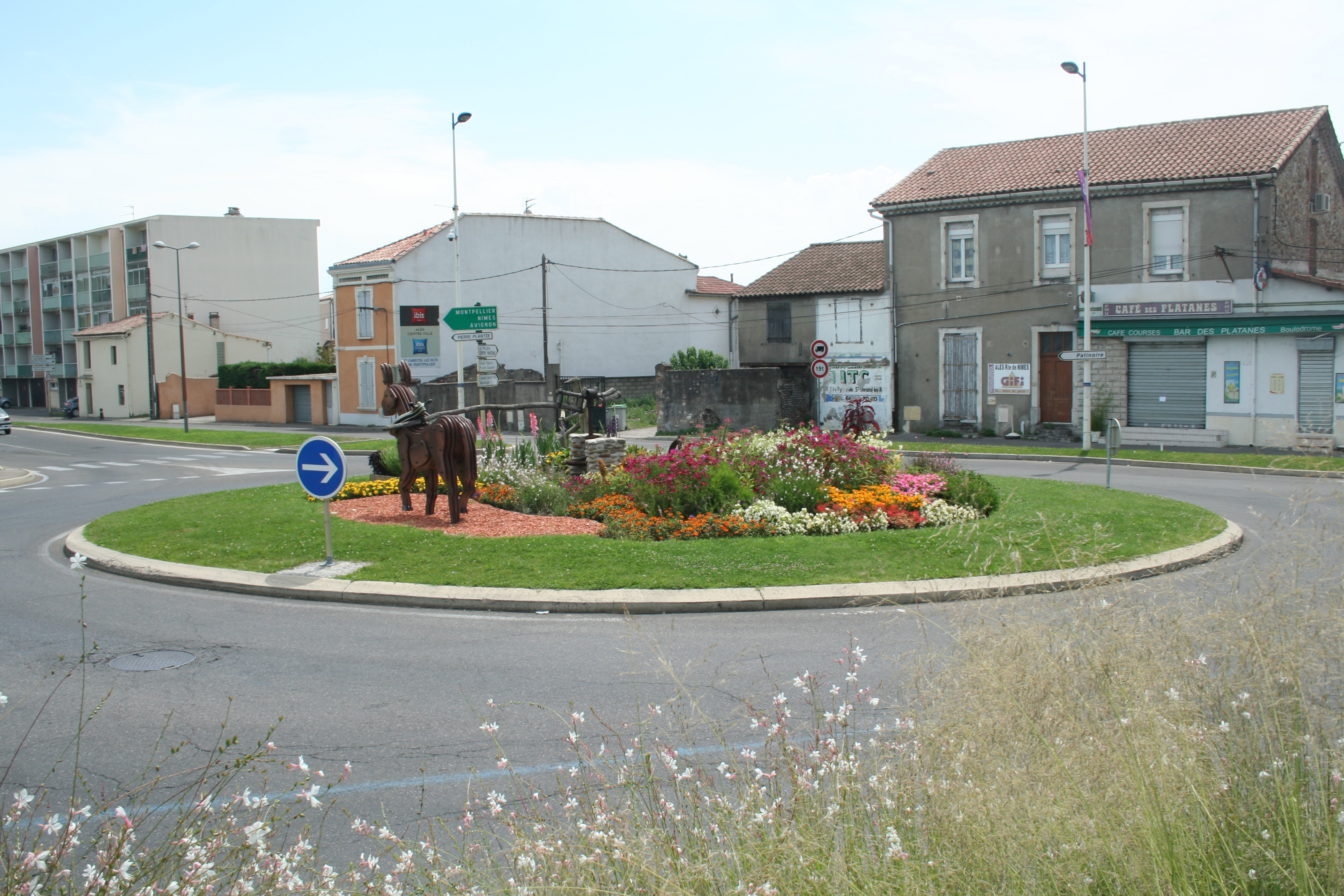 Alès (Gard) - rond-point représentant une noria